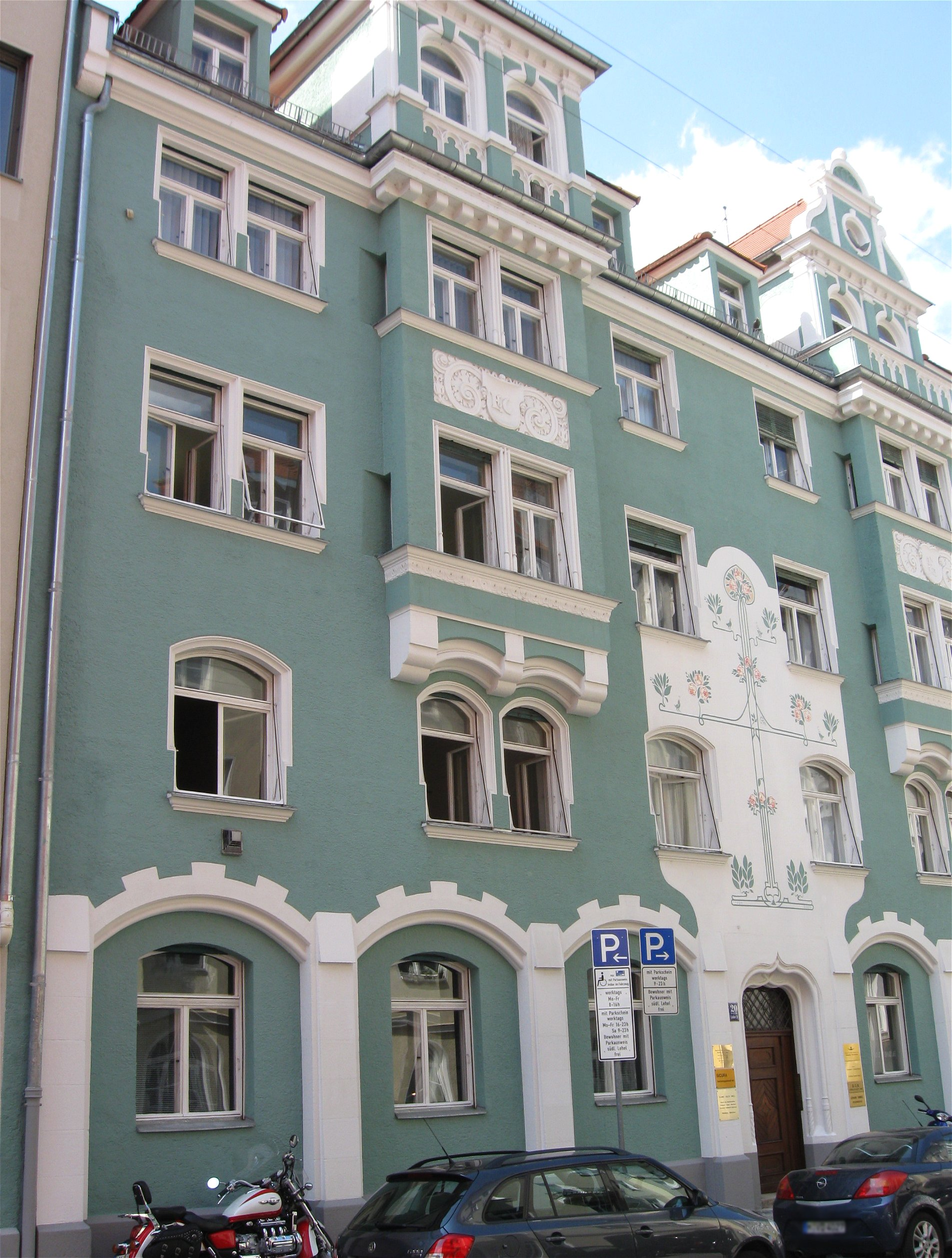 Liebherrstraße 20; Mietshaus, deutsche Renaissance, reich gegliedert, mit zwei Erkertürmchen, bez. 1903, von Heinrich Volbehr.